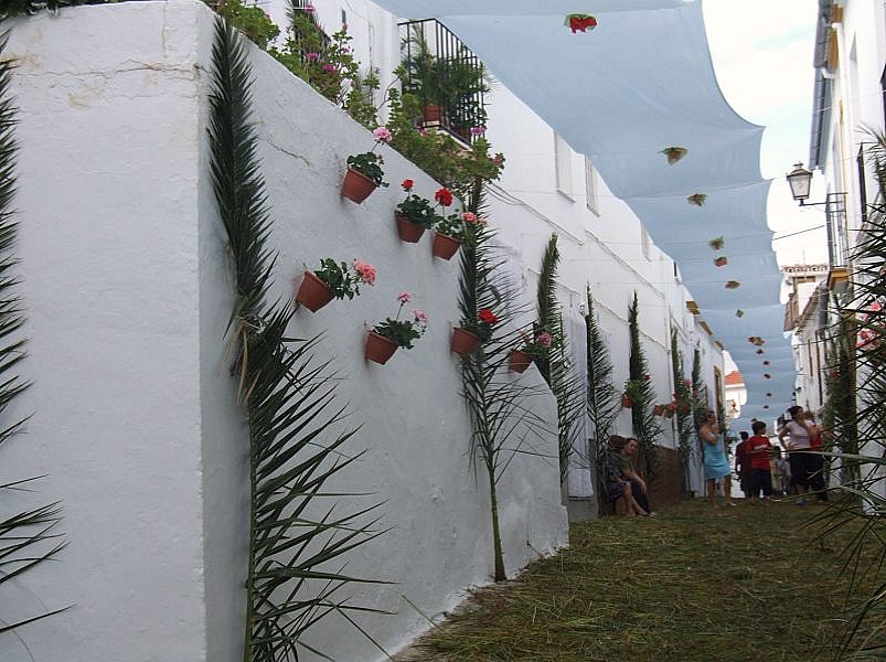 Calle engalanada para el Corpus Christi